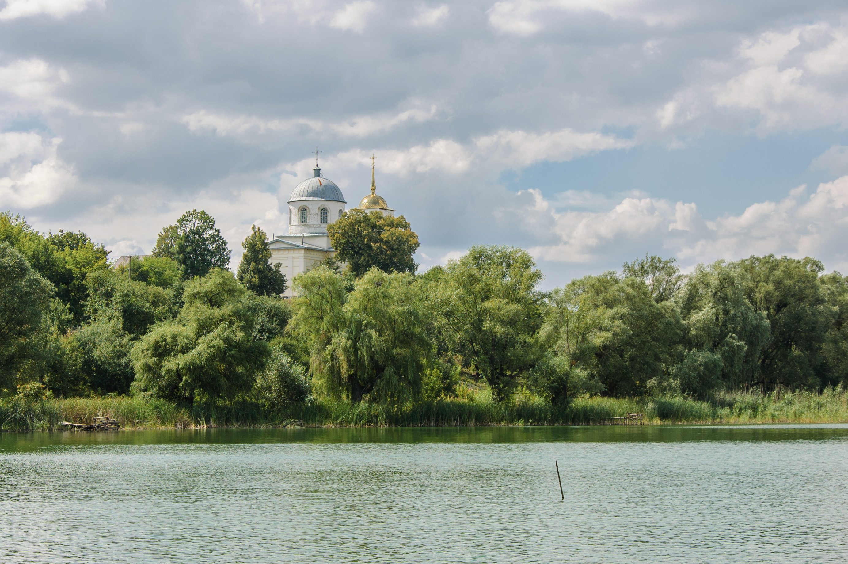 Миколаївська церква (мур.), Люботин, вул.Садова, 29-а